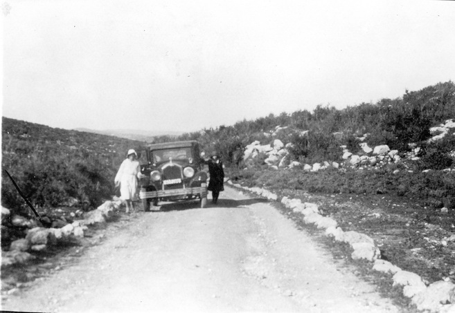 בק"מ ה- 48 בין הרטוב לבית ג'וברין 1932 - ניר (בוזנר)